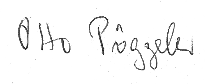 Otto Pöggeler. Signatur seines Briefes an mich vom 17.02.2009.